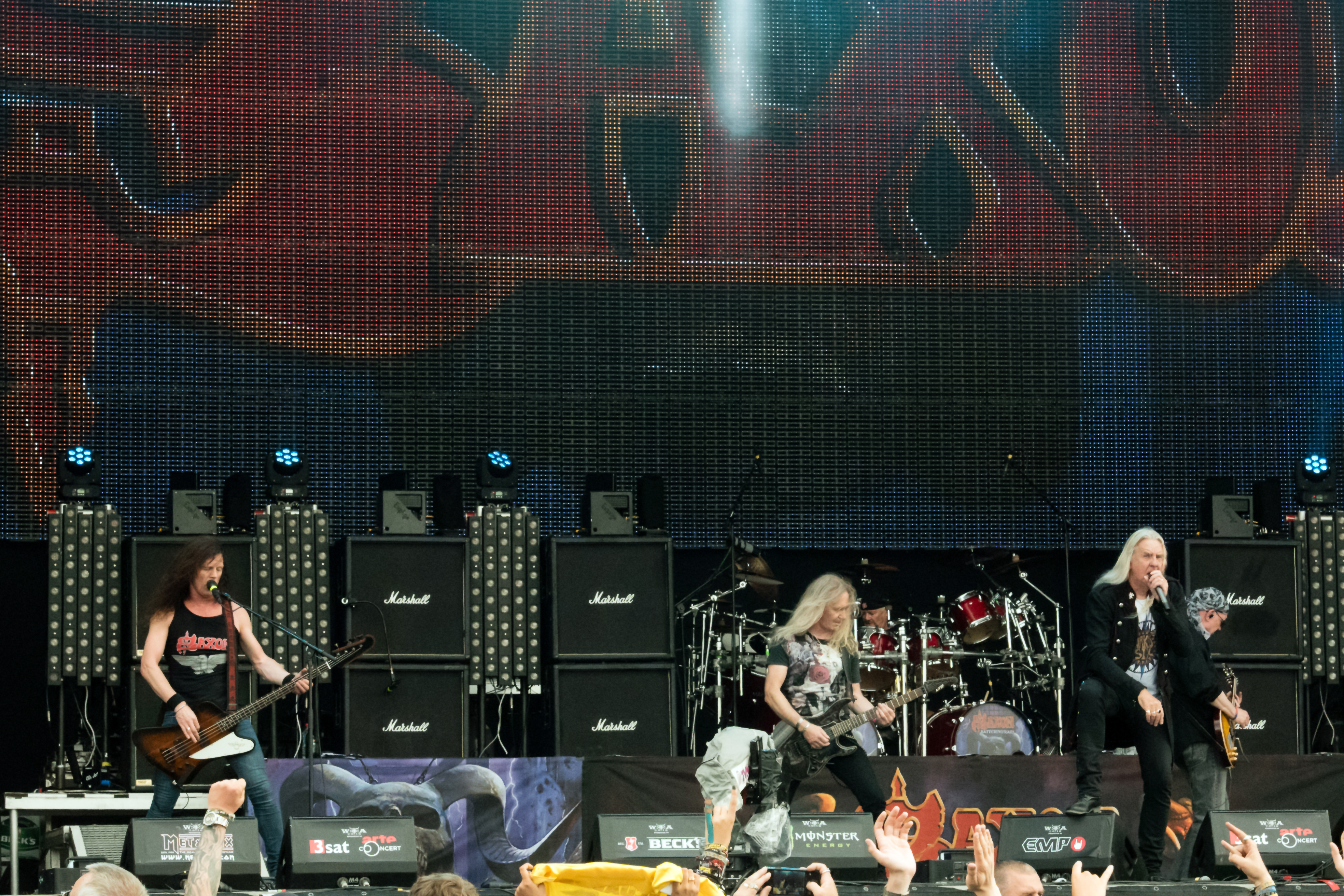 Saxon beim Wacken Open Air 2016